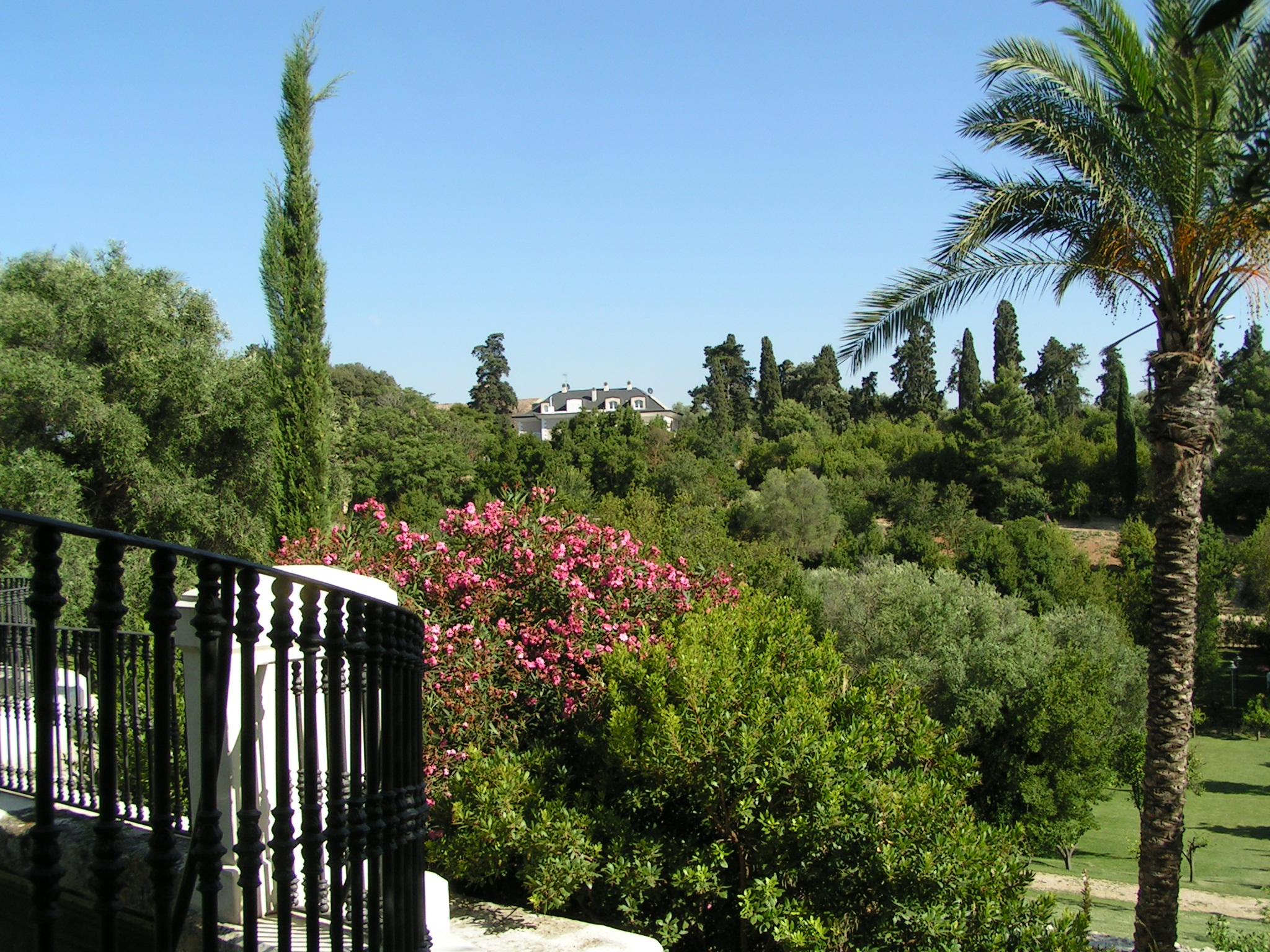 Un'altra veduta del parco. Parco di Monserrato.